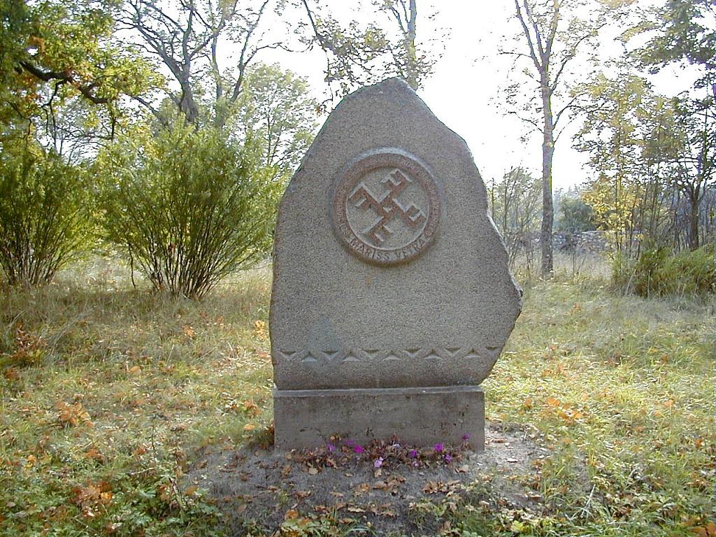 Tirzas Dārtiņas, M. Vētras piemiņas zīme 2001-09-21